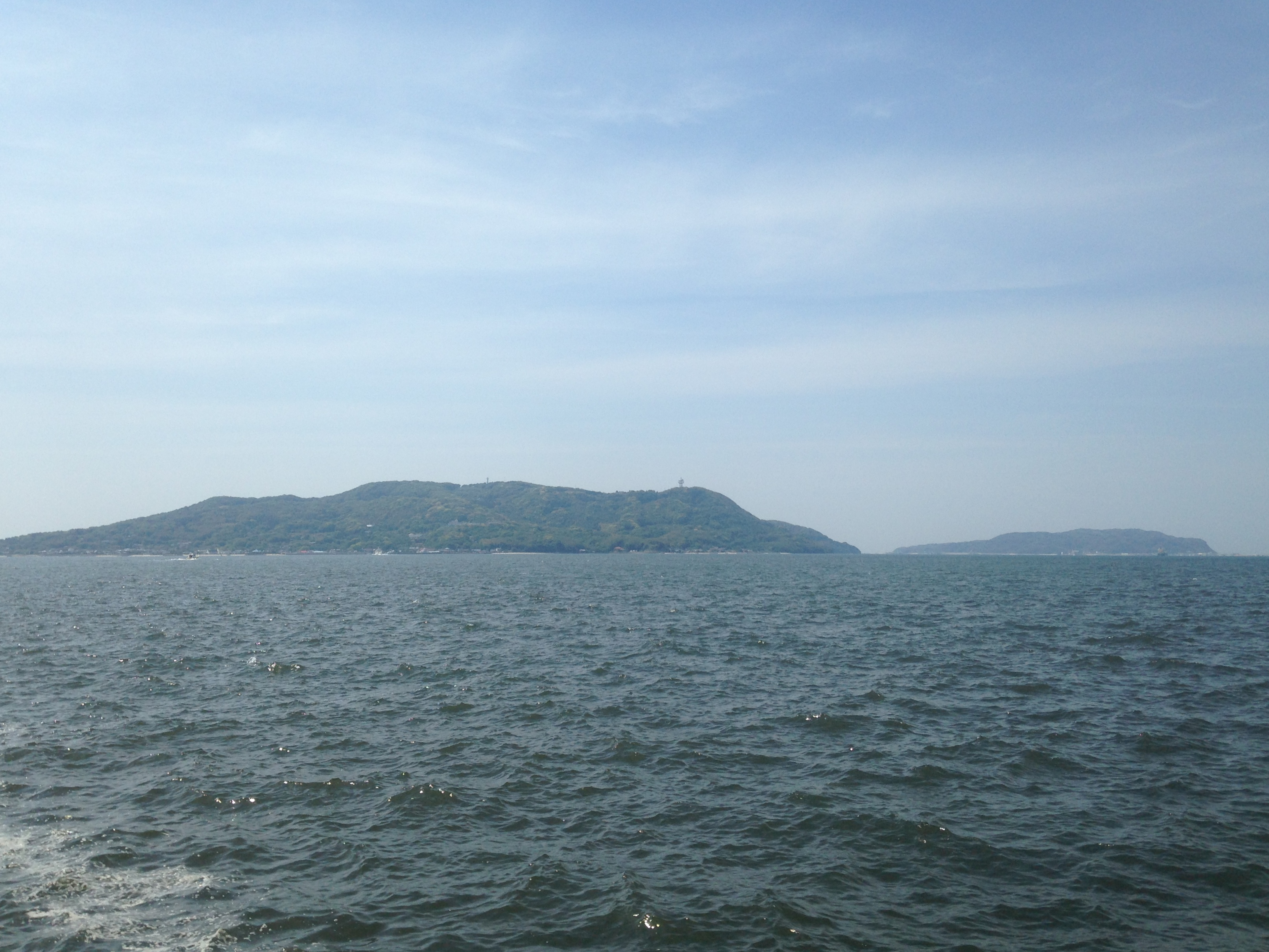 愛宕浜より望む能古島(左)と志賀島(奥)